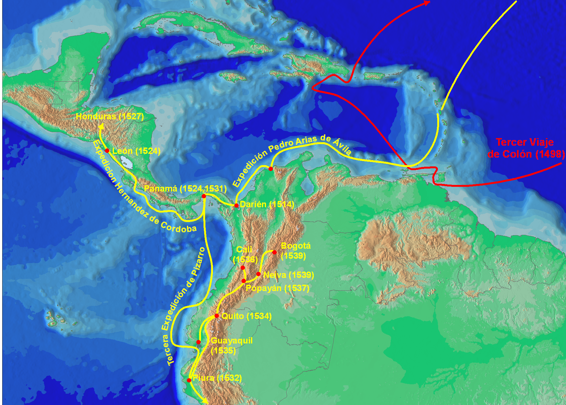 Ruta Sebastian de Belalcázar